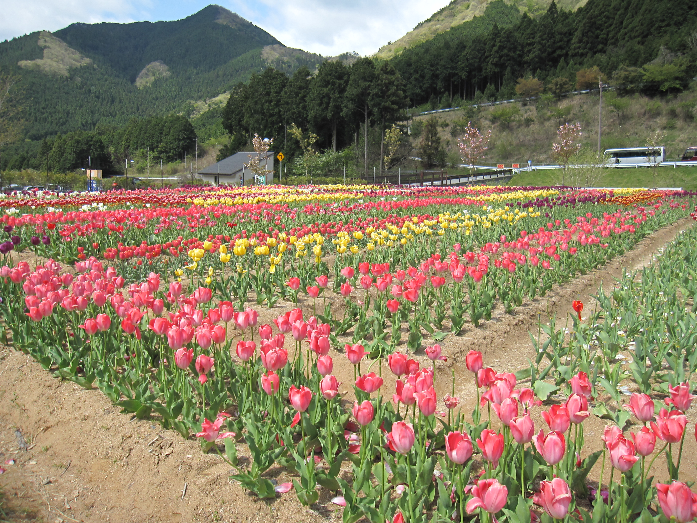 ヨーデルの森のチューリップ畑